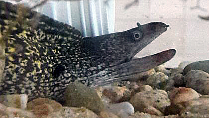 Mittelmeer-Muräne mit offenen Maul, Tamariu, Spanien, 2017